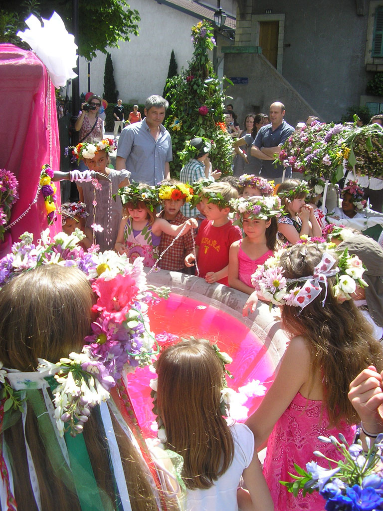 Cortège du « Feuillu » dans le Vieil-Onex, commune d'Onex à Genève. Le cortège des enfants portant des couronnes fleuries fait étape devant une fontaine décorée. Réintroduction en 2011 de la tradition locale, perdue depuis la fin des années 1960.